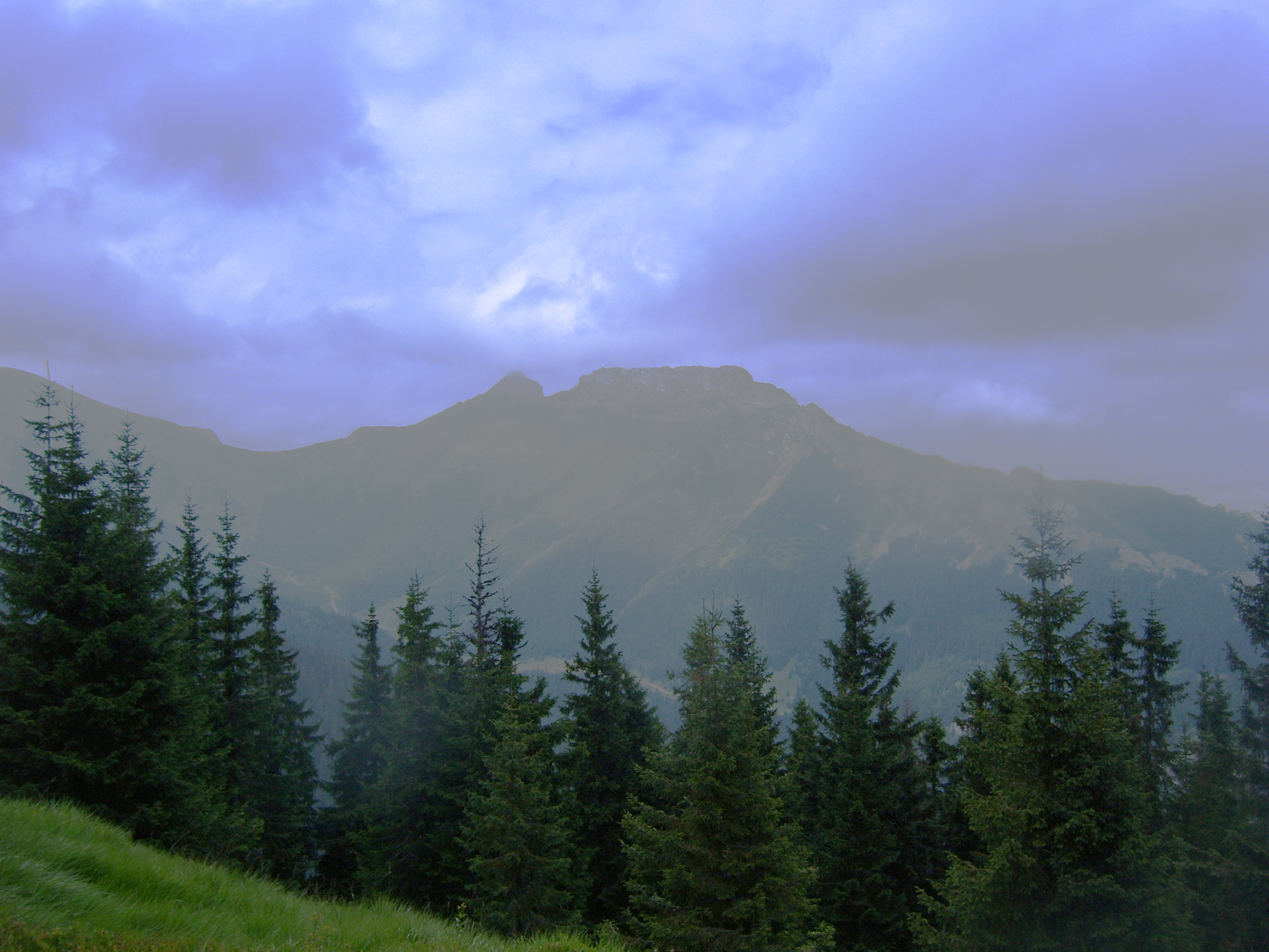 Dar Młodzieży widziany z Myślenickich Turni.